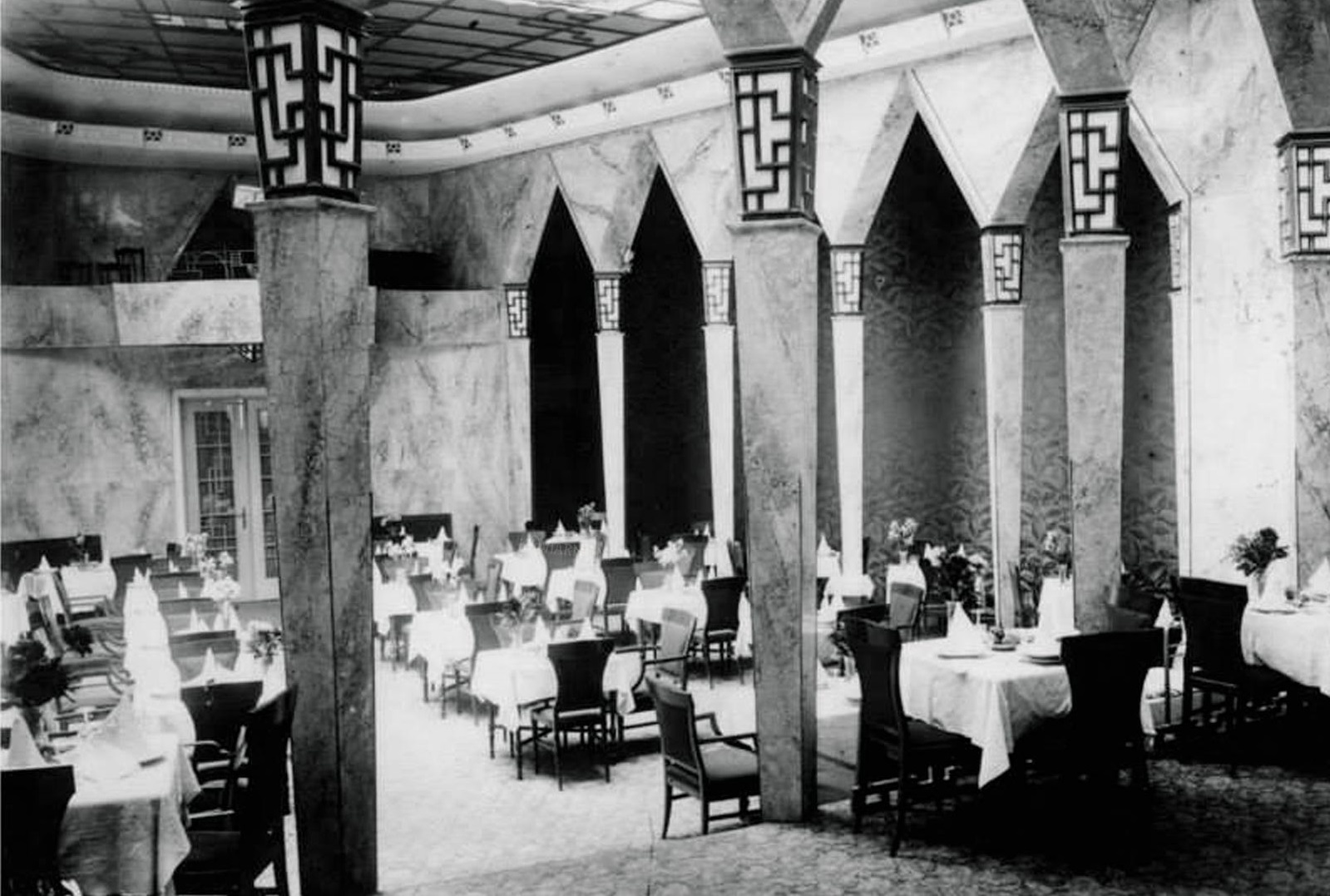 Старі фото Львова